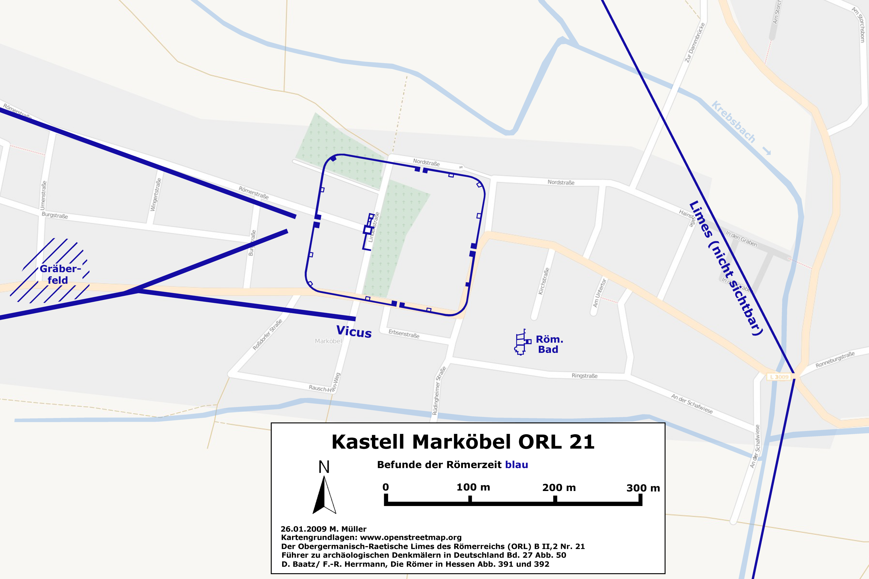 Kastell Marköbel am Wetteraulimes. Lageplan.